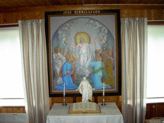 Grängsbo Lillkyrka Foto Användare:Staffe21. Ur mailkonversation: Hej "Habj", ja märk den som GFDL. Jag har ingeting emot det om bilden sprids vidare eller kopieras.